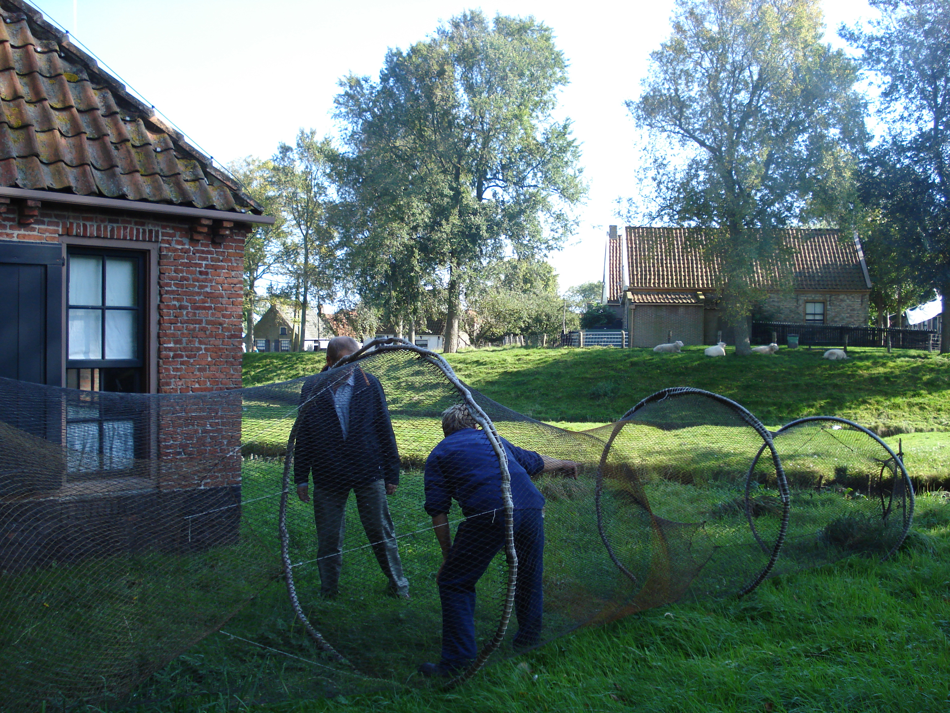 Deze grote haringfuiken werden gebruikt langs de noordwestkust van Friesland voordat de Afsluitdijk werd aangelegd